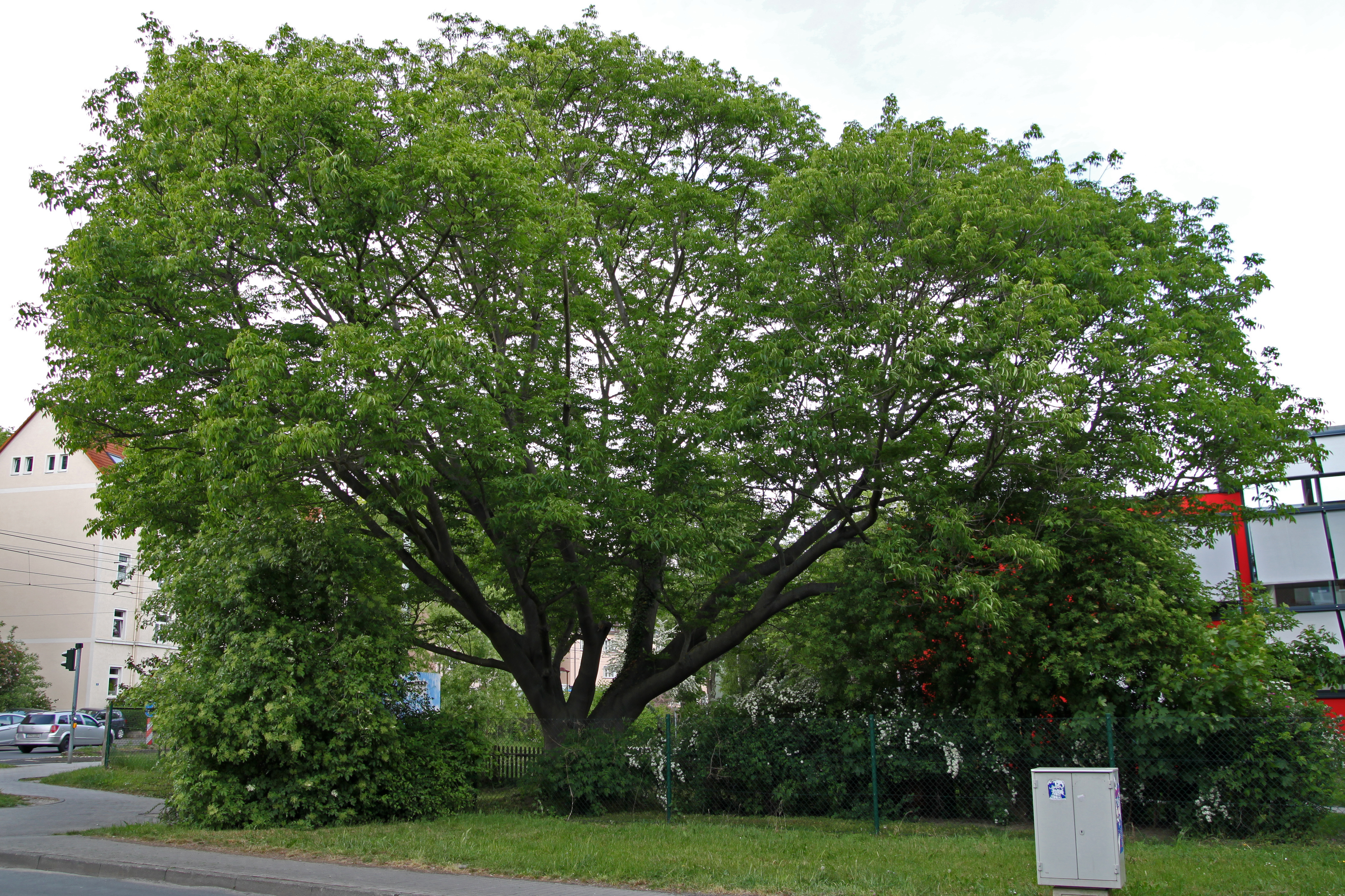 Jena Naturdenkmal Hupeh-Stinkesche Scharnhorststraße, Index: 1996-22